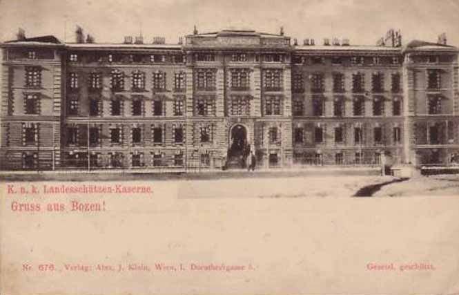 Kaserne des Landesschützenregiments Nr II in Bozen